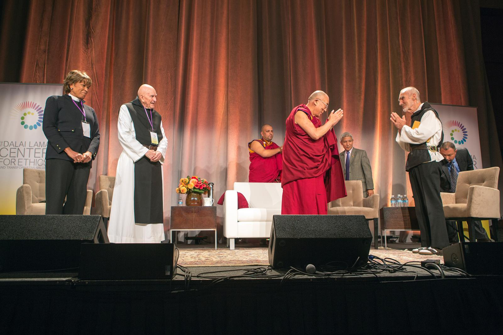 Tenzin Gyatso - 14th Dalai Lama